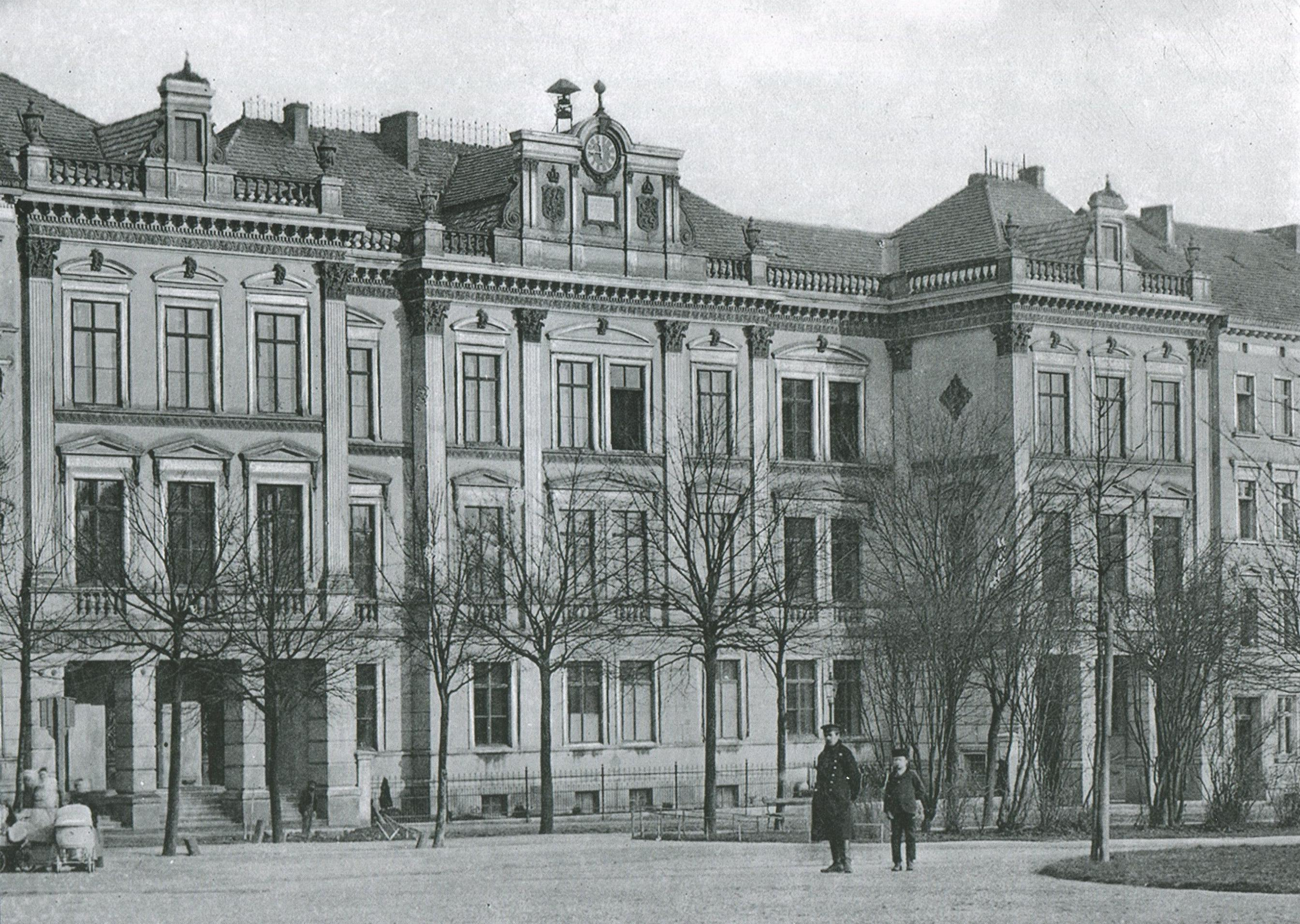 Die Gewerbeschule (heute: Joliot-Curie-Gymnasium) auf dem Wilhelmsplatz in Görlitz